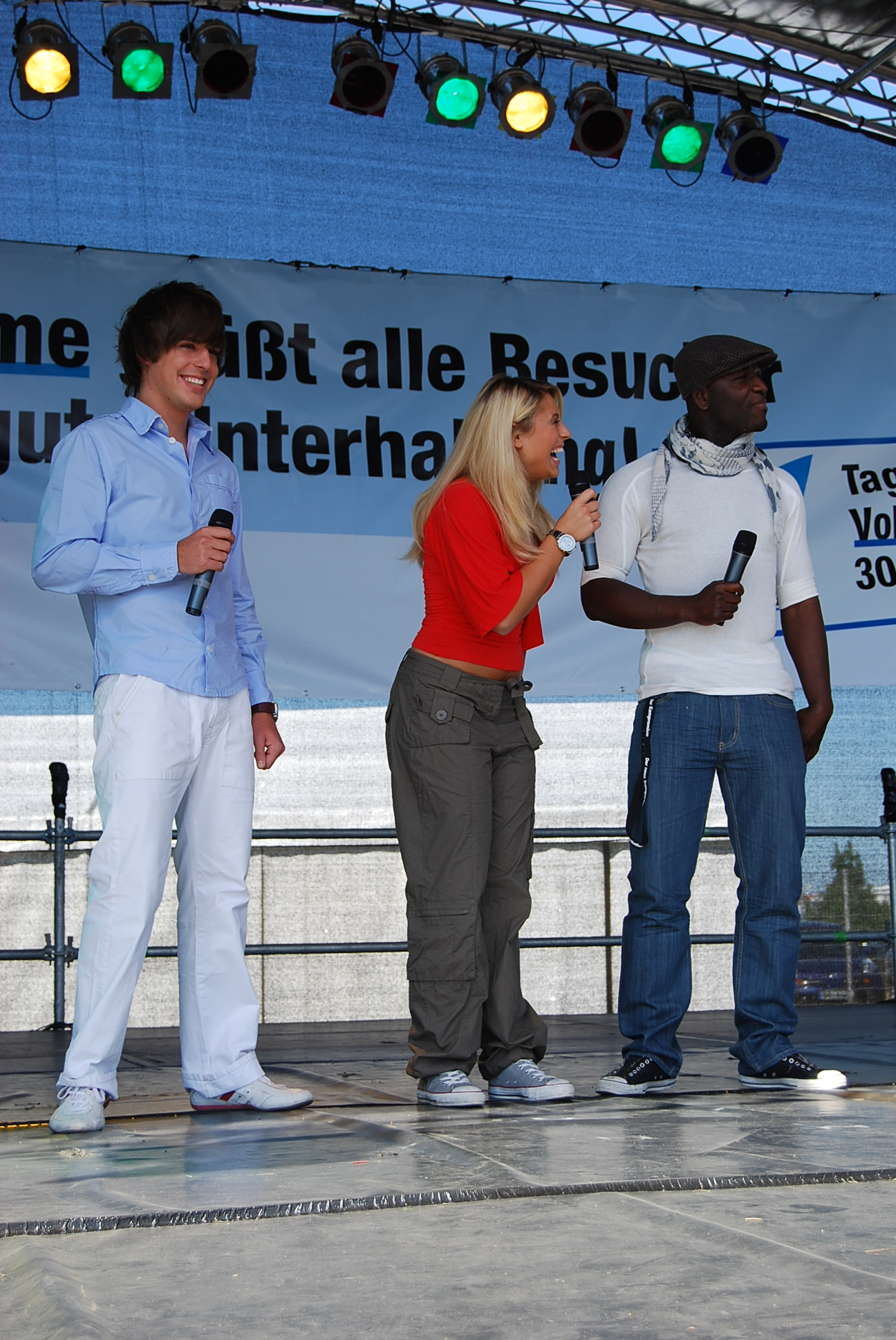 DSDS-"Stars" beim Tag der offenen Tür im Druckzentrum Barleben